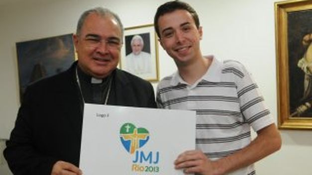 Presentación del logotipo oficial de la Jornada Mundial de la Juventud de Río de Janeiro de 2013. En la foto el autor del logotipo.